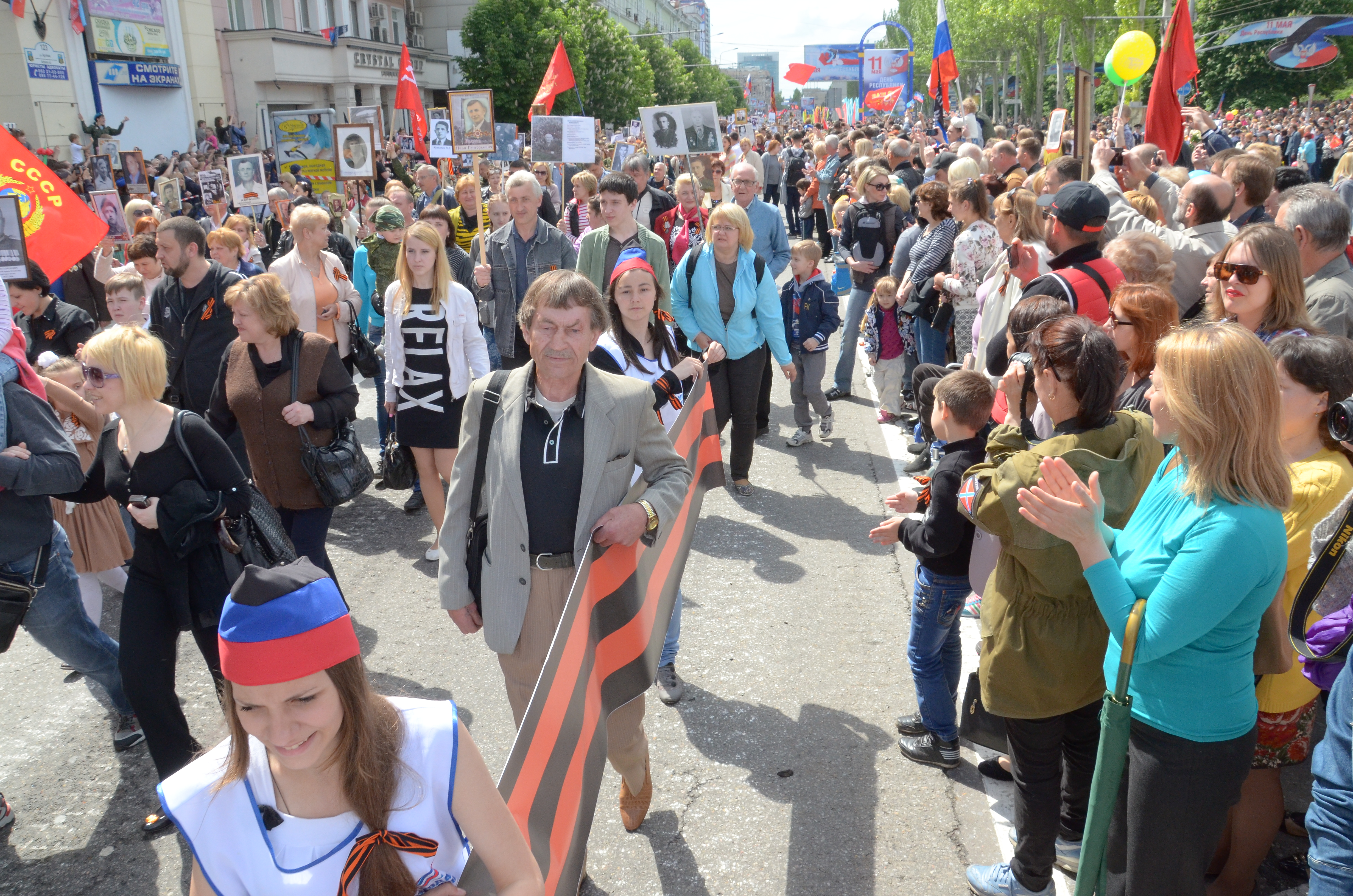 День Победы в Донецке